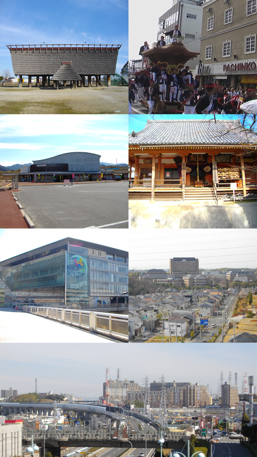 投稿者自身が大阪府和泉市のイメージ写真を撮影・編集したもの。 最上段:池上・曽根遺跡（左）、和泉だんじり祭（右） 2段目:南部リージョンセンター（左）、松尾寺（右） 3段目:和泉シティプラザ（左）、桃山学院大学（右） 最下段:和泉市の中心市街地